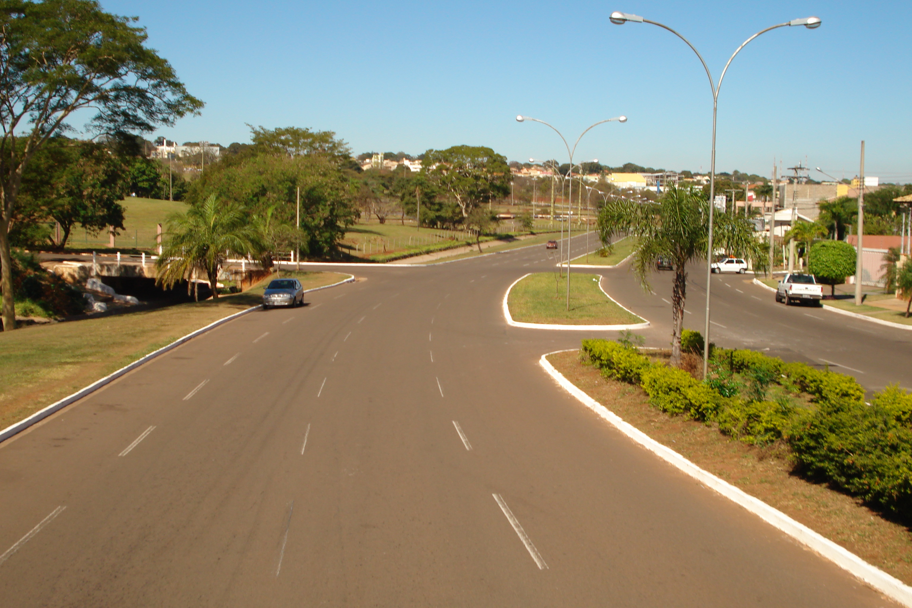 Via Park